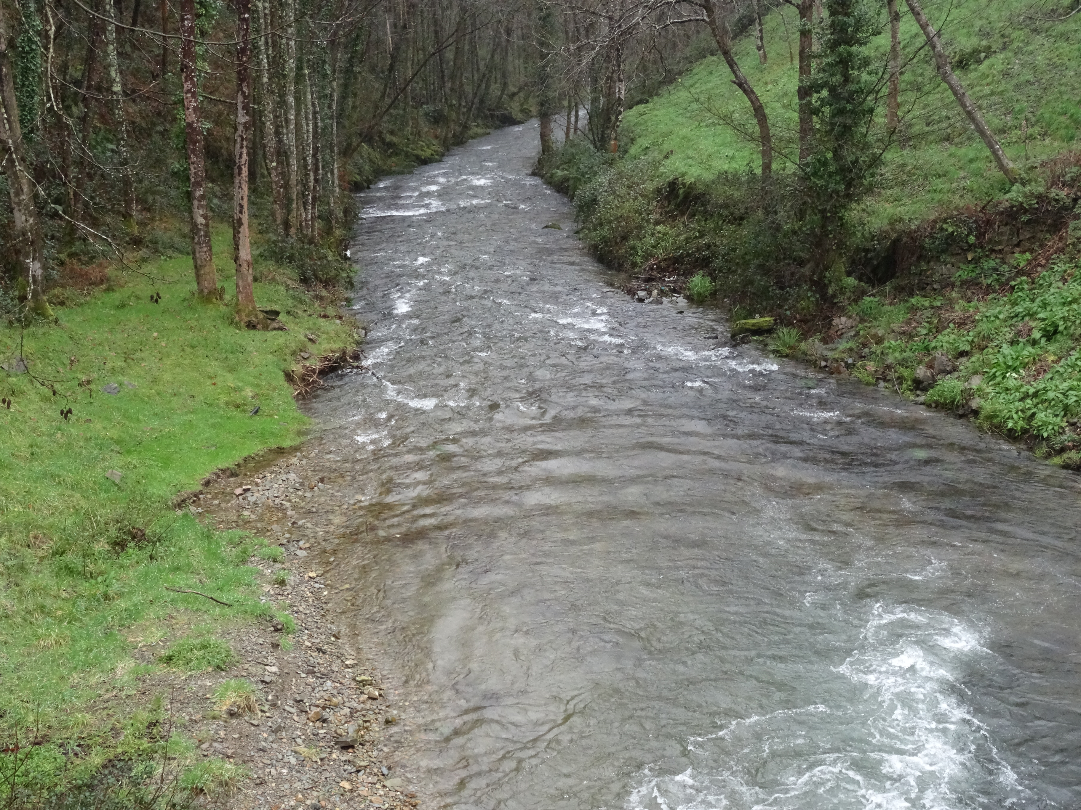 Río Turía despois de recibir a auga do río Cabreira.